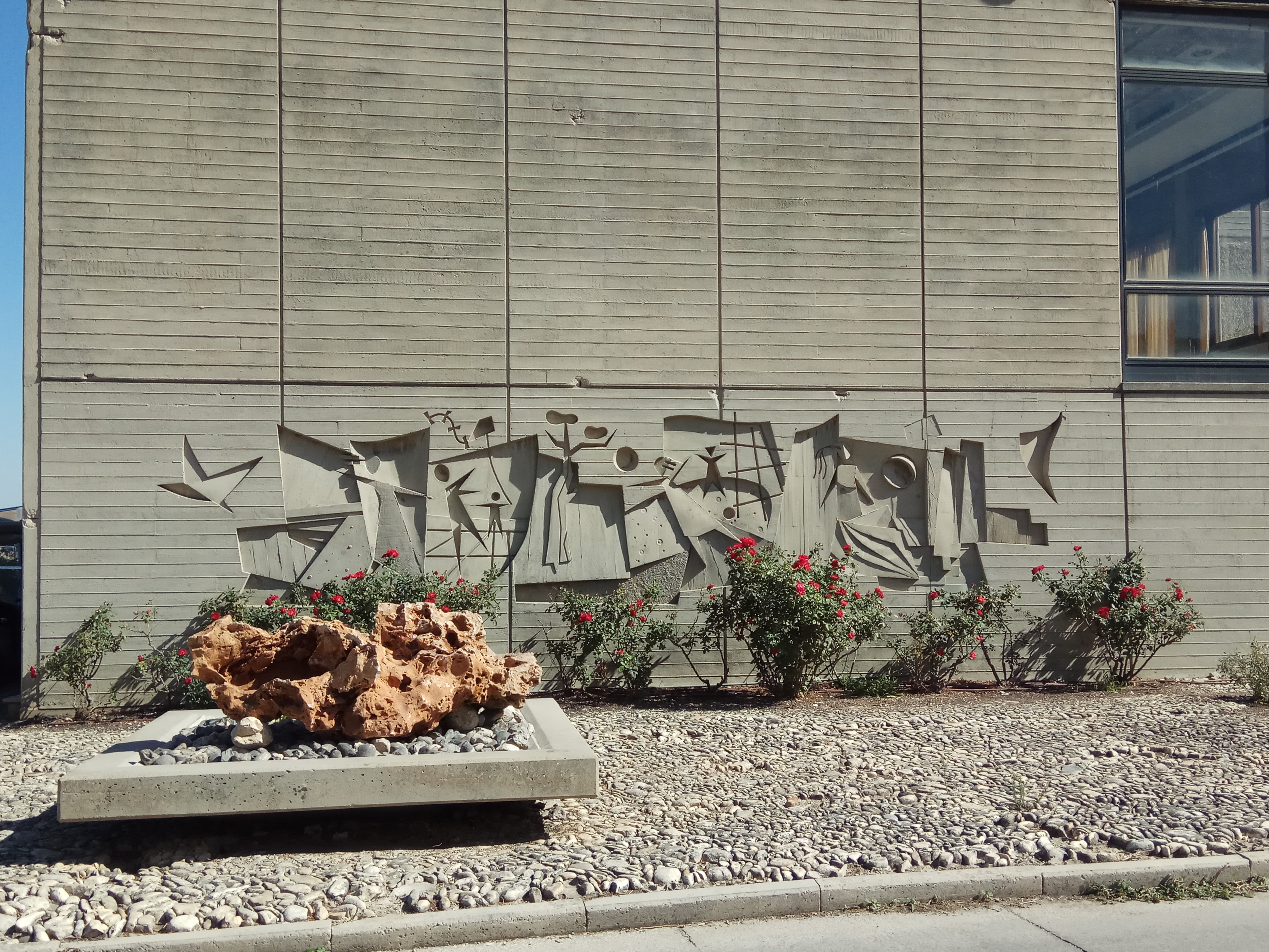 התבליט "שמחה" של רודא ריילינגר על קיר חדר האוכל בקיבוץ הזורע